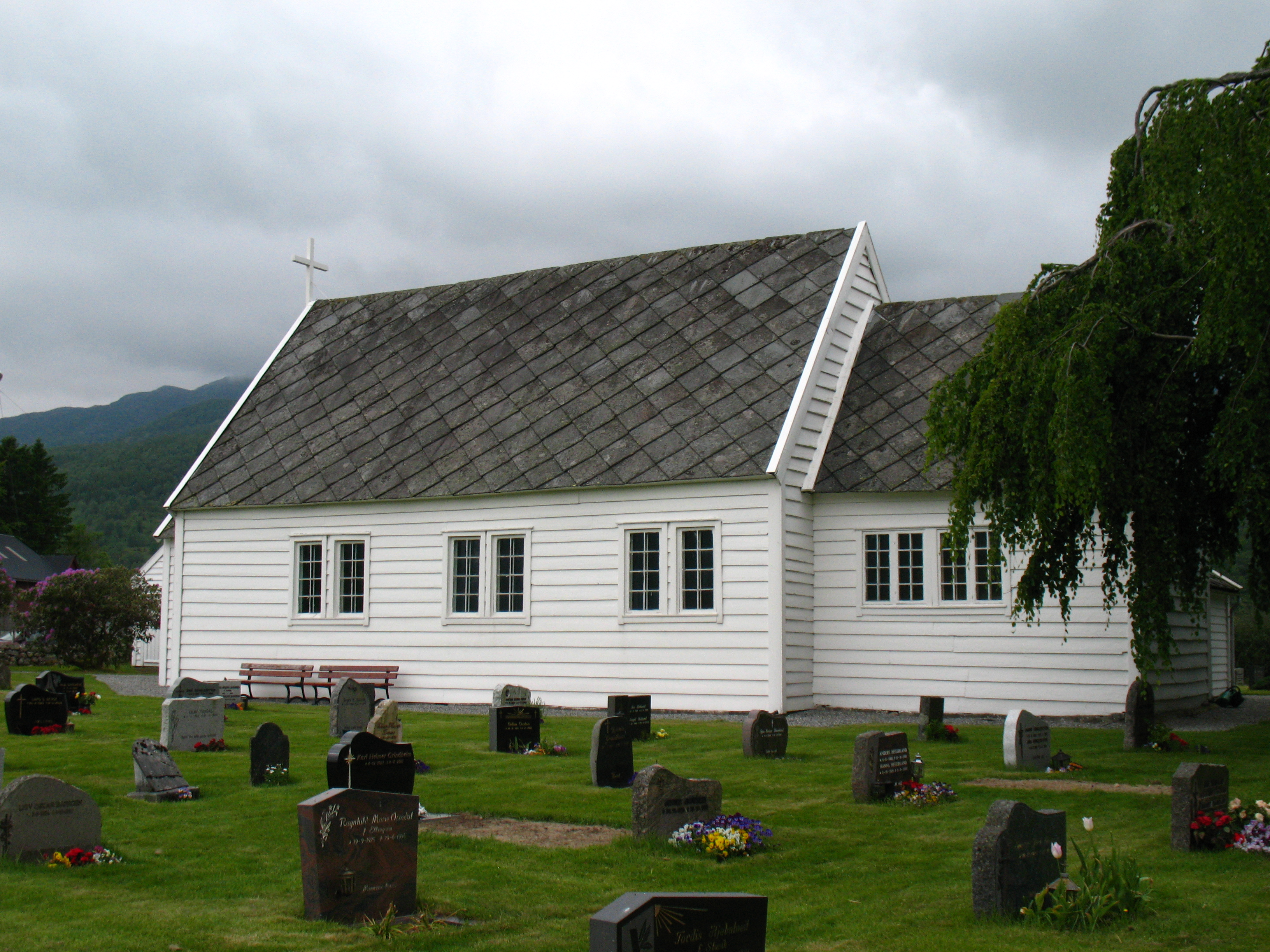 På garden Grindheim i Etne, truleg bygd mellom juli 1723 og mars 1724